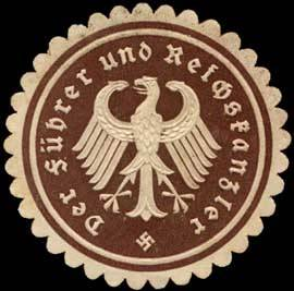 Sealing stamp Title: Der Führer und Reichskanzler Description: Adolf Hitler, braun ,weiß, geprägt Place: size: 5 cm